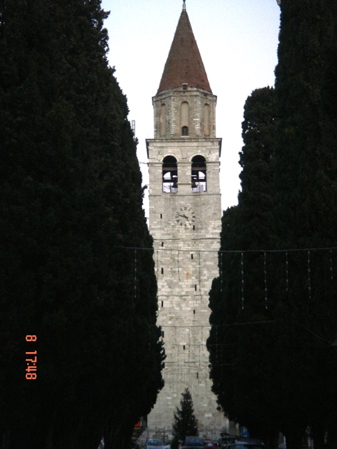 ŐLa Basilica di Aquileia Campanile